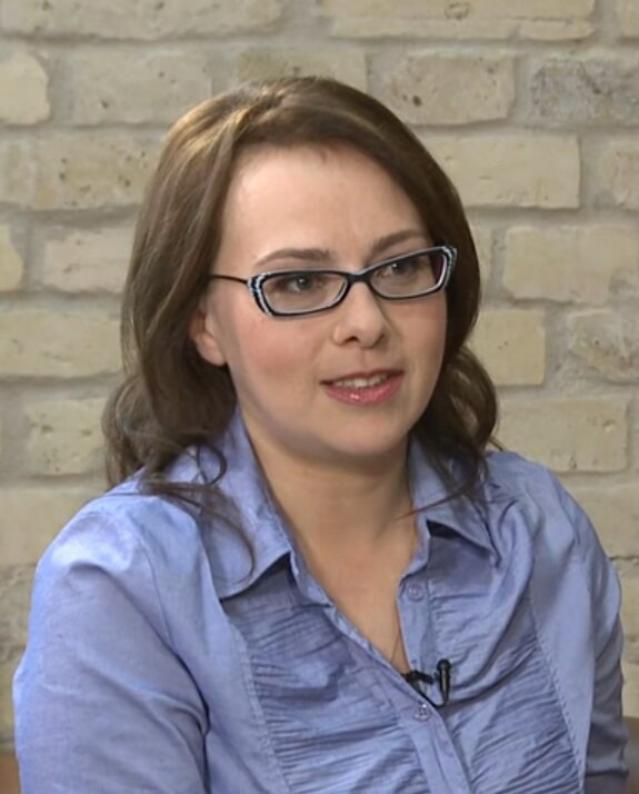 Анна Канопацкая в феврале 2015 года